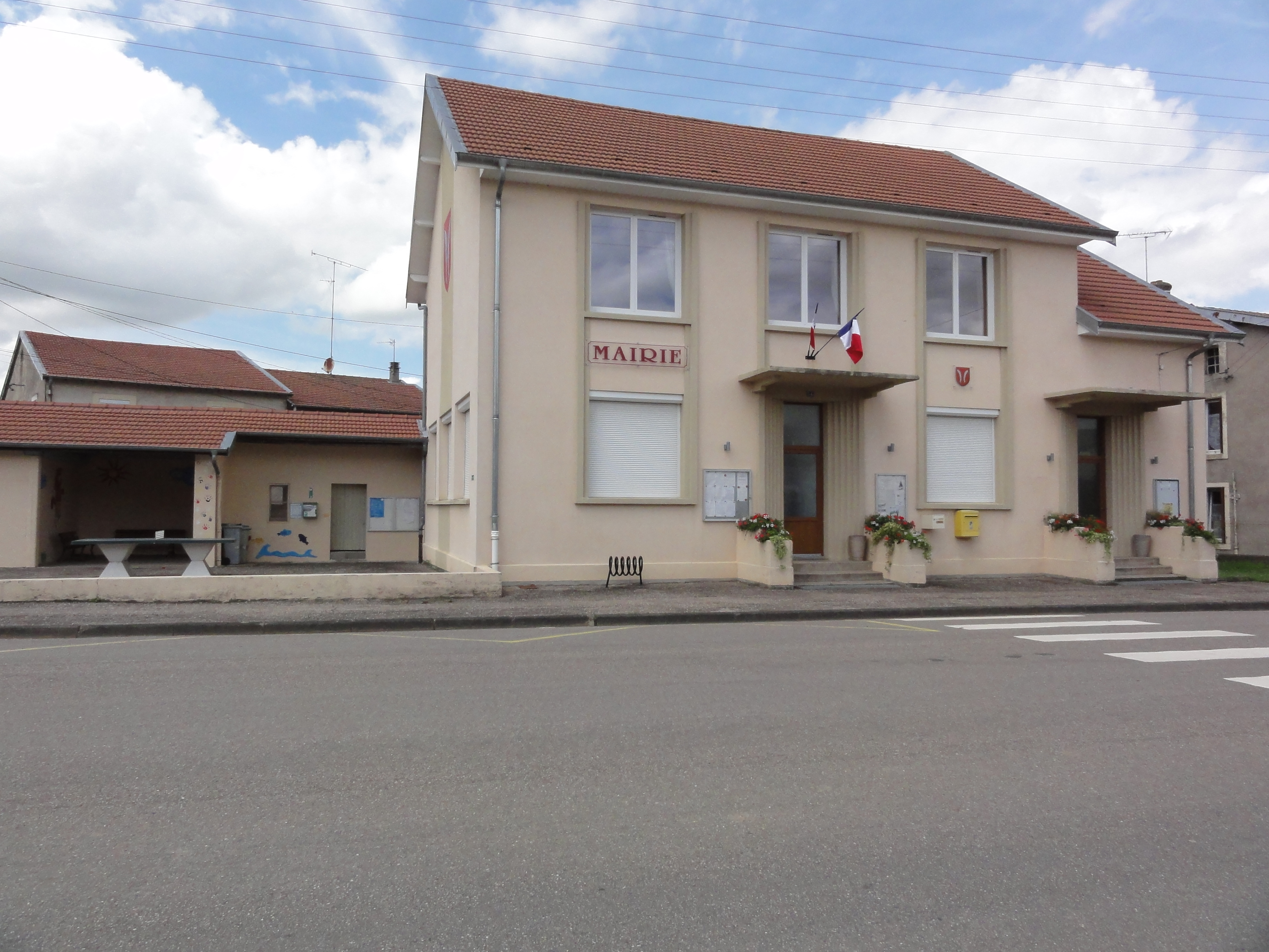 Arracourt (M-et-M) mairie